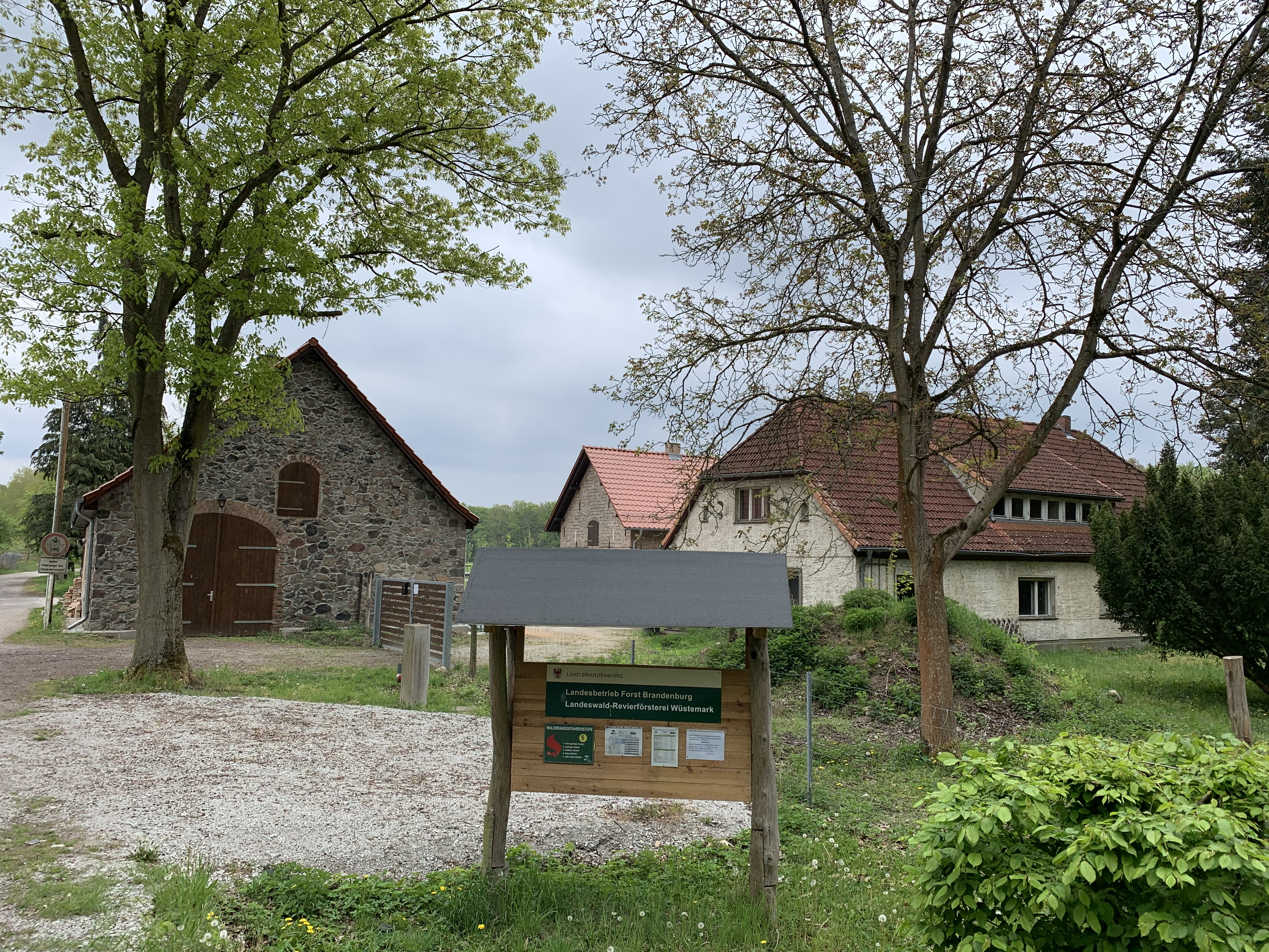 Wüstemark, ein Wohnplatz der Gemeinde Zeuthen in Brandenburg